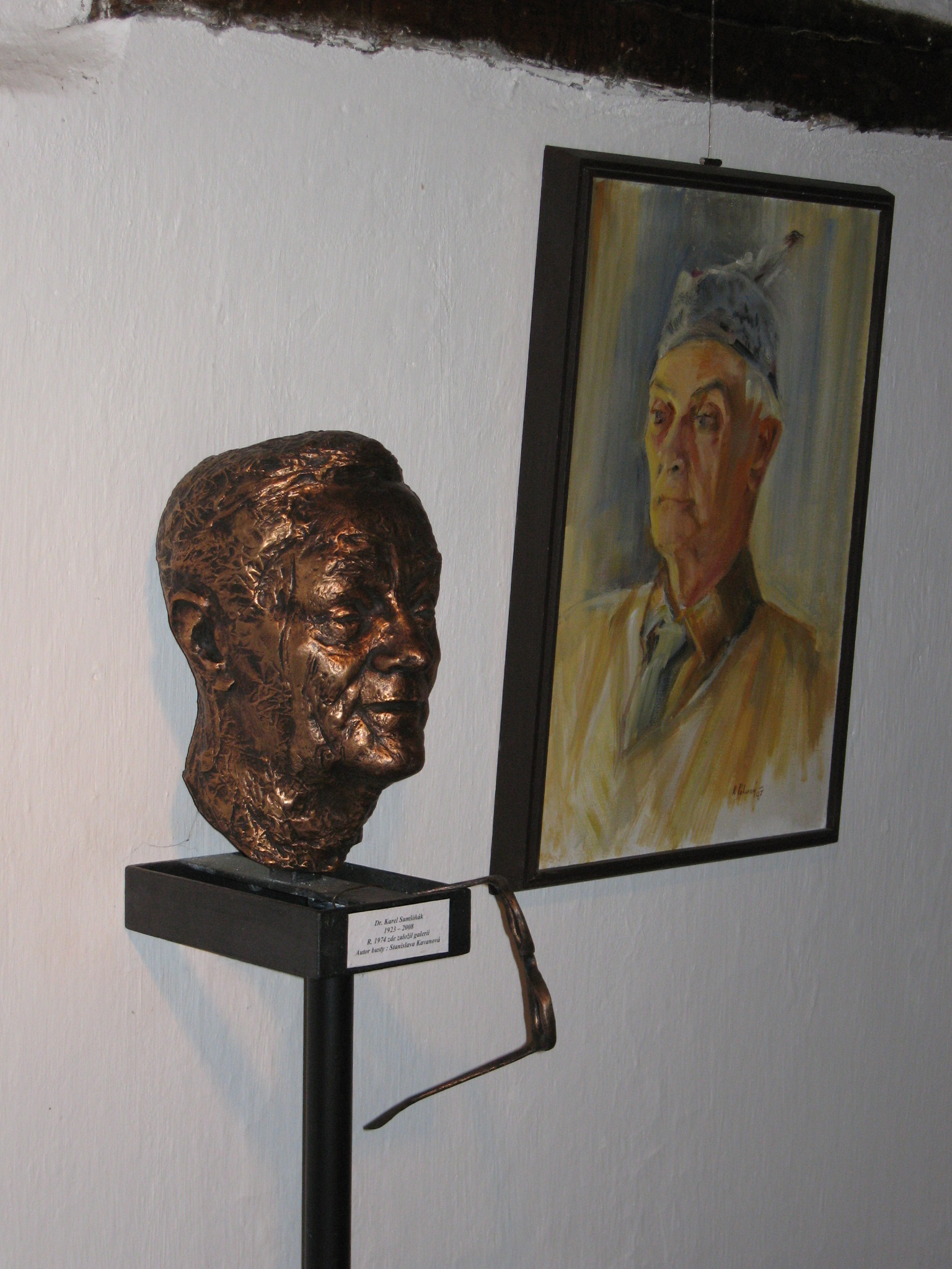 Busta Karla Samšiňáka od ak. sochařky Stanislavy Kavanové a portrét od Václava Pokorného (z inventáře Šolcova statku v Sobotce)